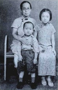 조계진 여사와 이종찬 남매, 가운데 소년이 이종찬